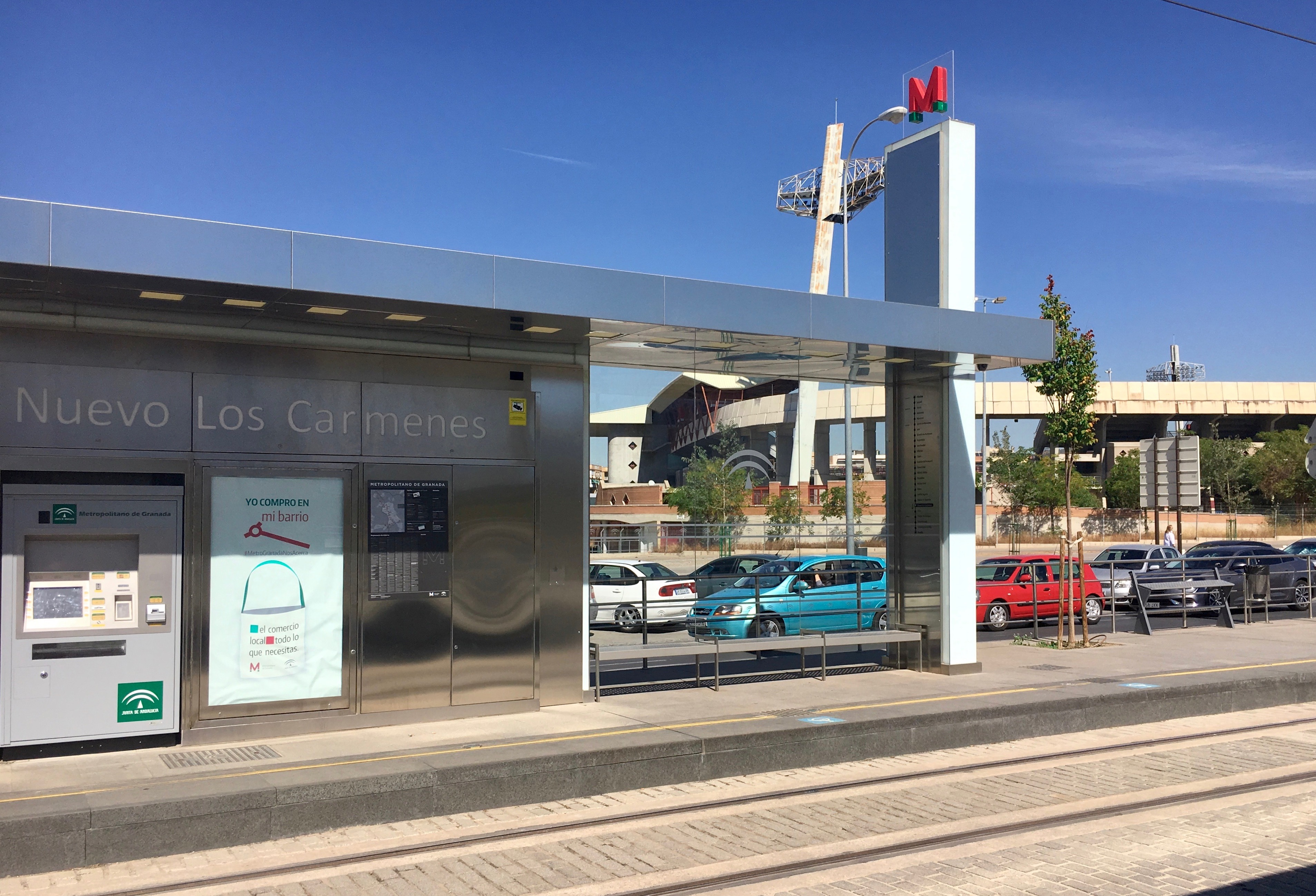 Andenes de Nuevo Los Cármenes, estación del Metro de Granada. Al fondo, el Estadio de Nuevo Los Cármenes